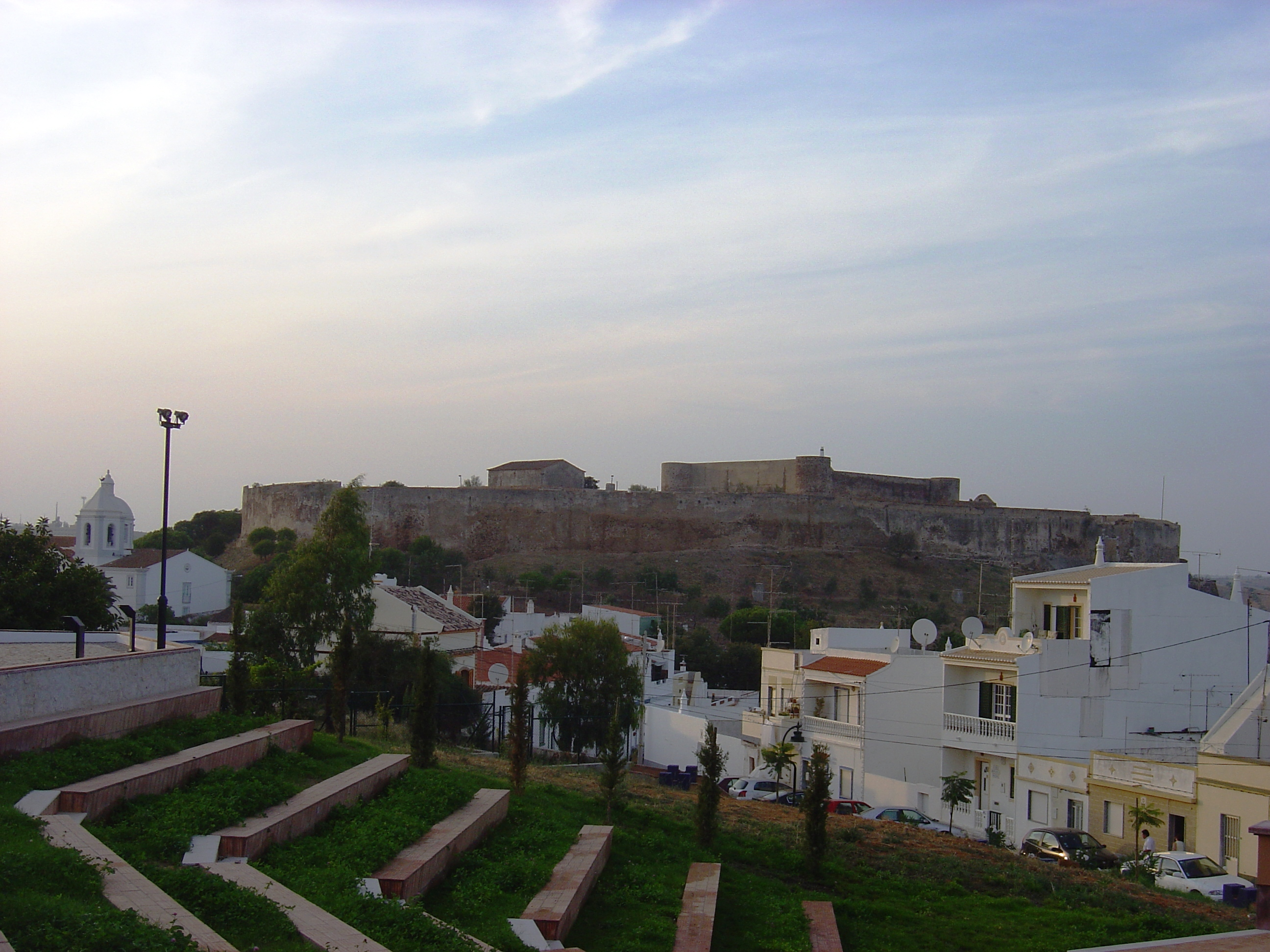 Castle, Castro Marim, Portugal